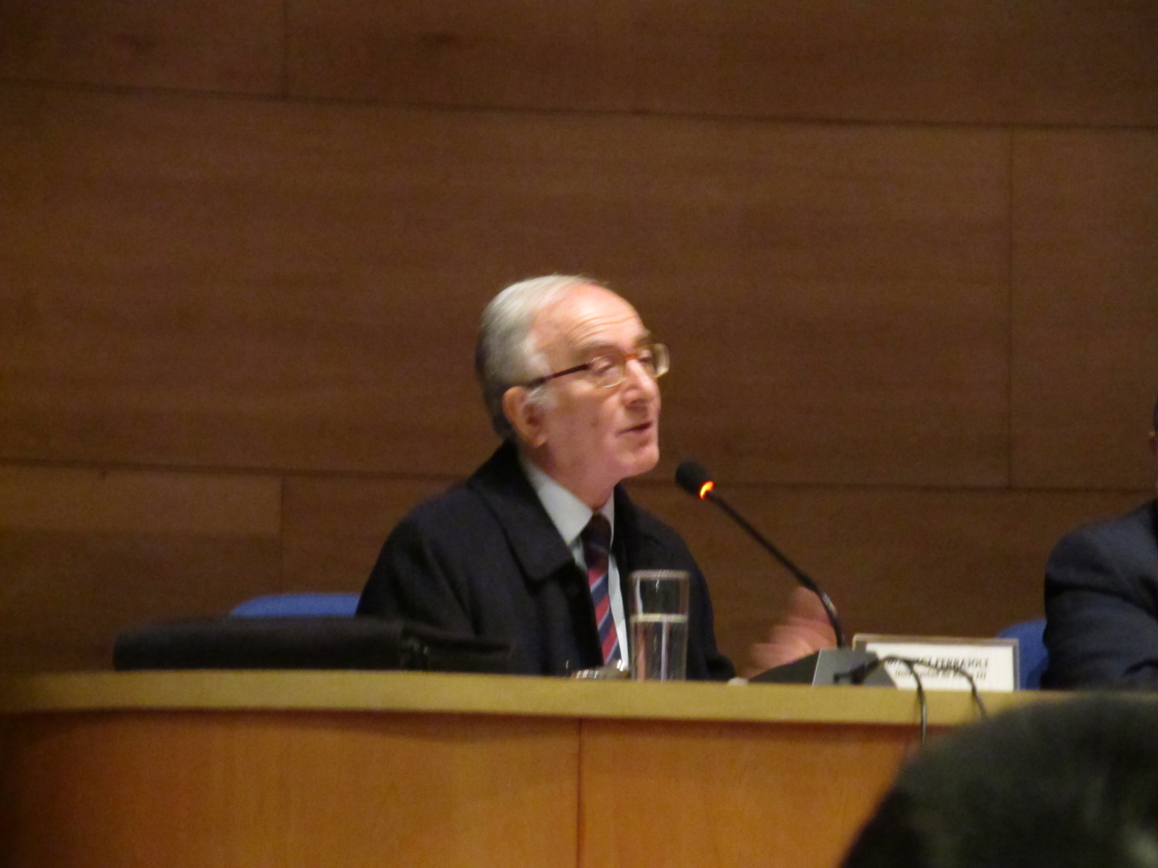 Luigi Ferrajoli, jurista italiano en la Facultad de Derecho de la Universidad de Chile.